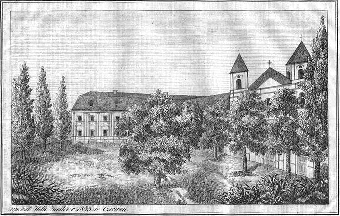 Kościół i klasztor Księży Cystersów w Bledzewie, od strony południowo-zachodniej.